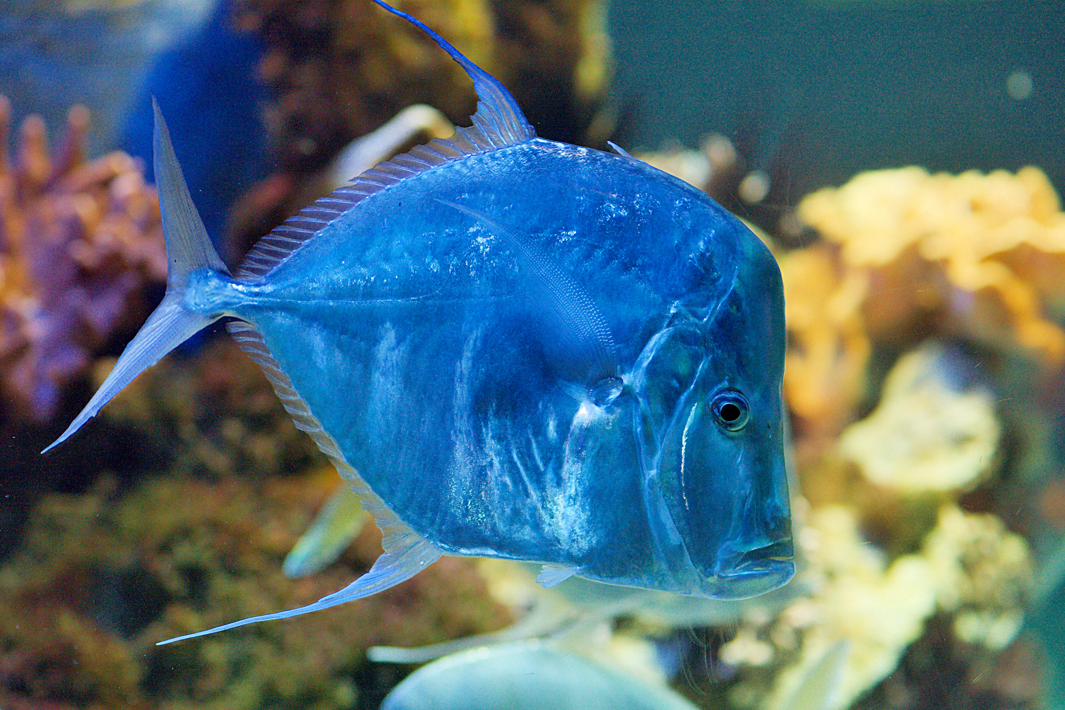 Selene vomer Photographed in "Haus der Natur" Salzburg, Austria